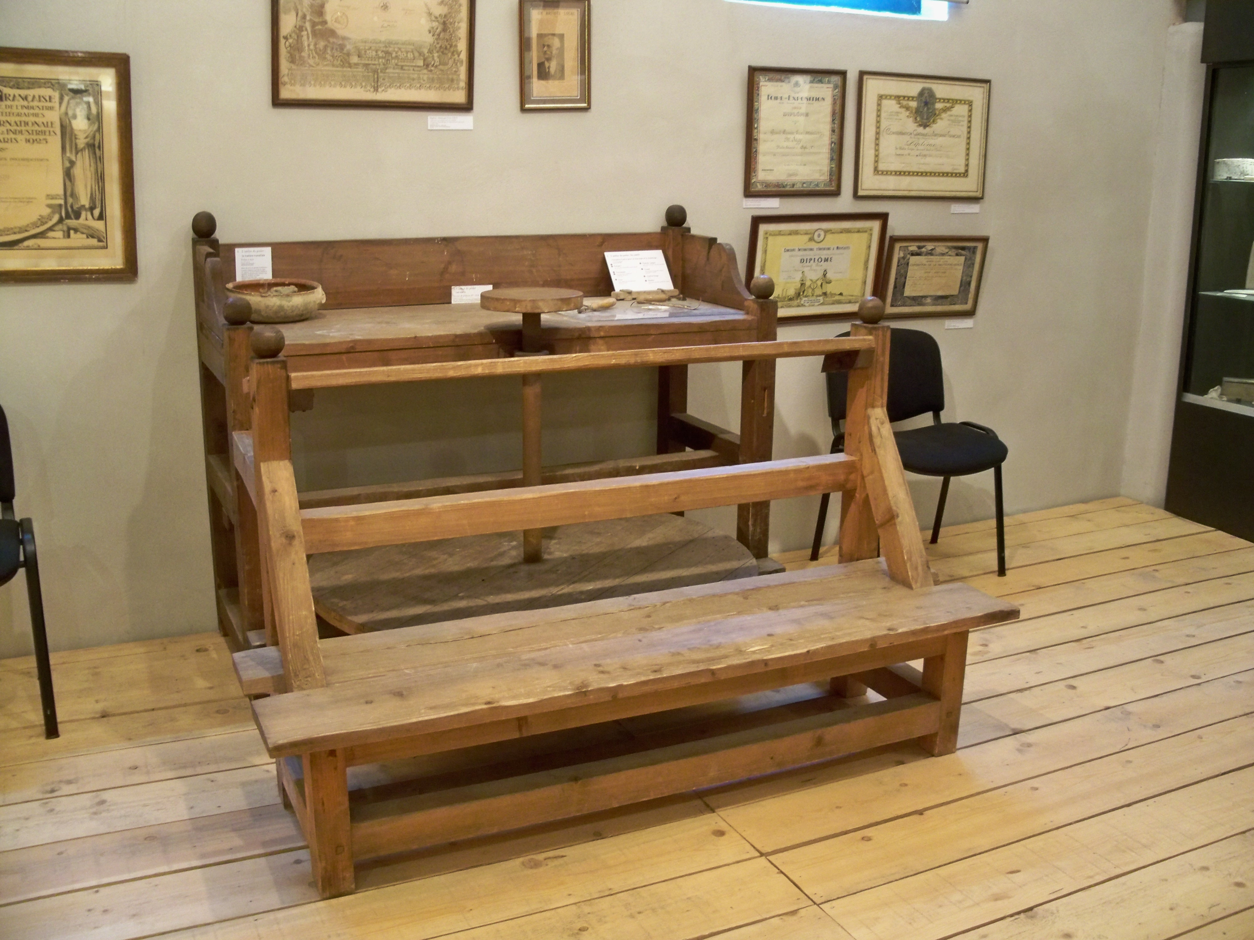 Ancienne table de travail de Léon Sagy, faiencier à Apt (84)